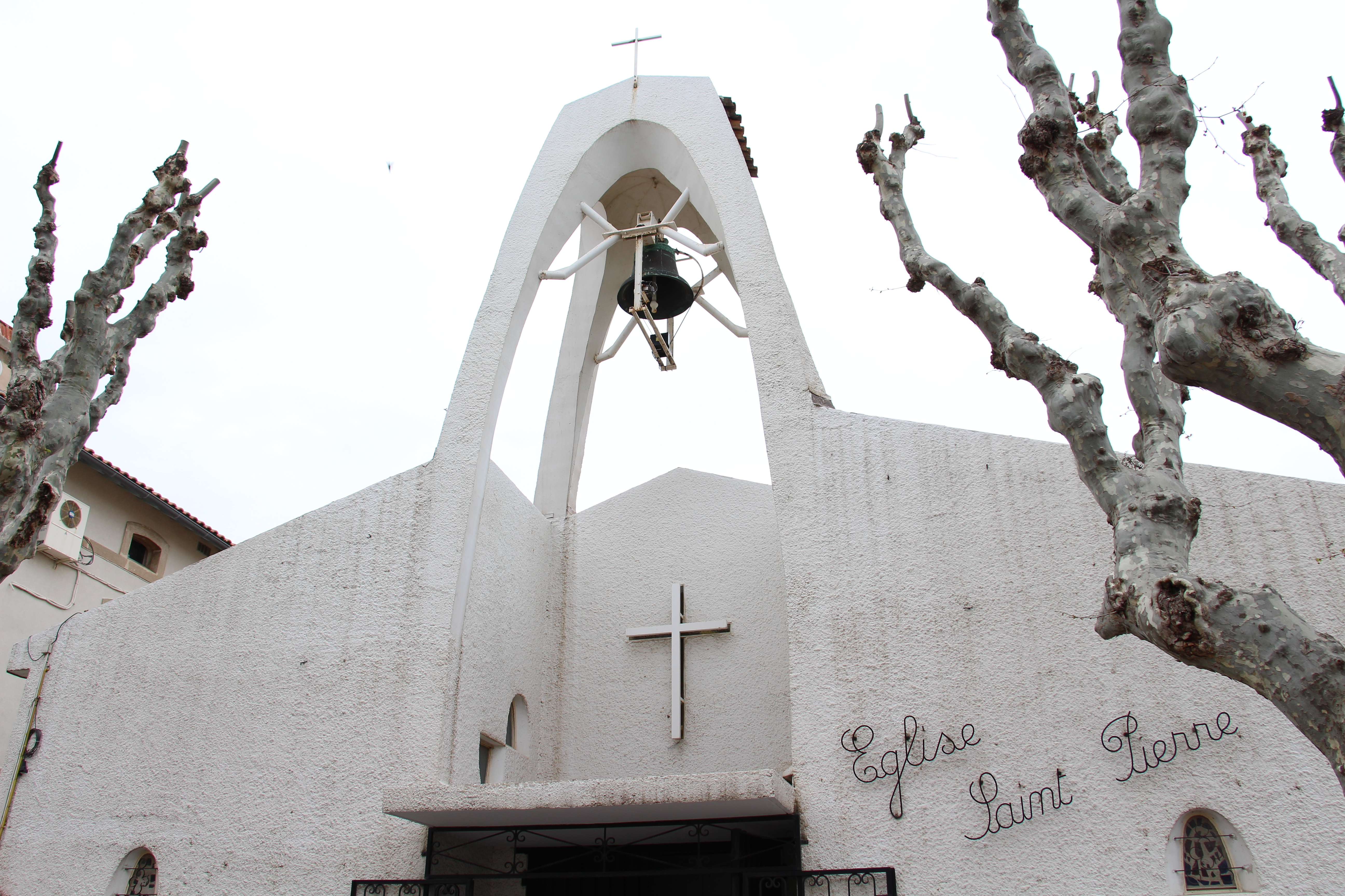 Place Docteur Belsamond Ramain St. Peter Church.